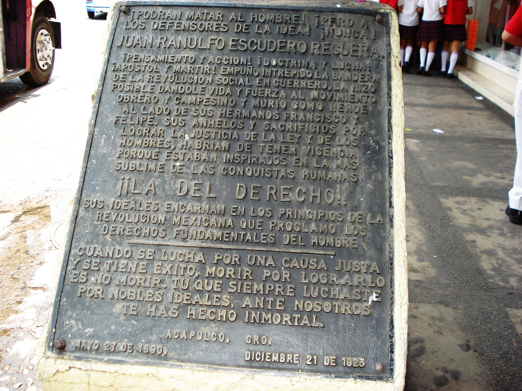 Placa inmortal de Juan R. Escudero (1890-1923) situada en el numero 10 de la Avenida Juan R. Escudero (o Avenida Cuauhtémoc) donde se ubicó su domicilio en la Colonia Centro de Acapulco, Guerrero, México.